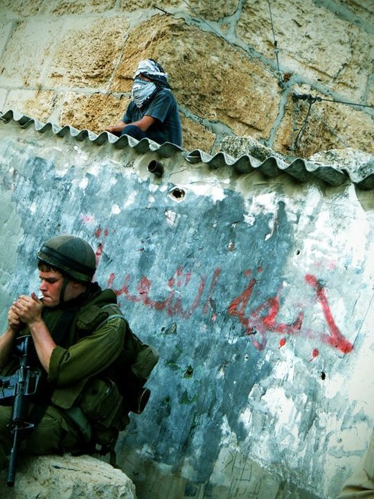 יפתח רווה בסרטו של יריב הורוביץ רוק בקסבה